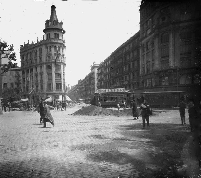 Fotografia del carrer de Pelai l'any 1925 feta per Josep Salvany.